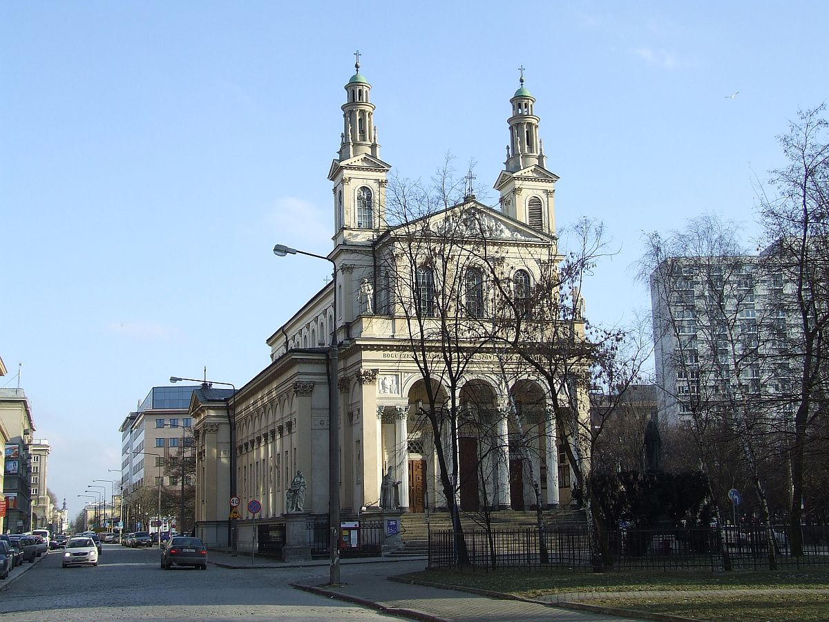 Kościół św. Karola Boromeusza w Warszawie (Wola)